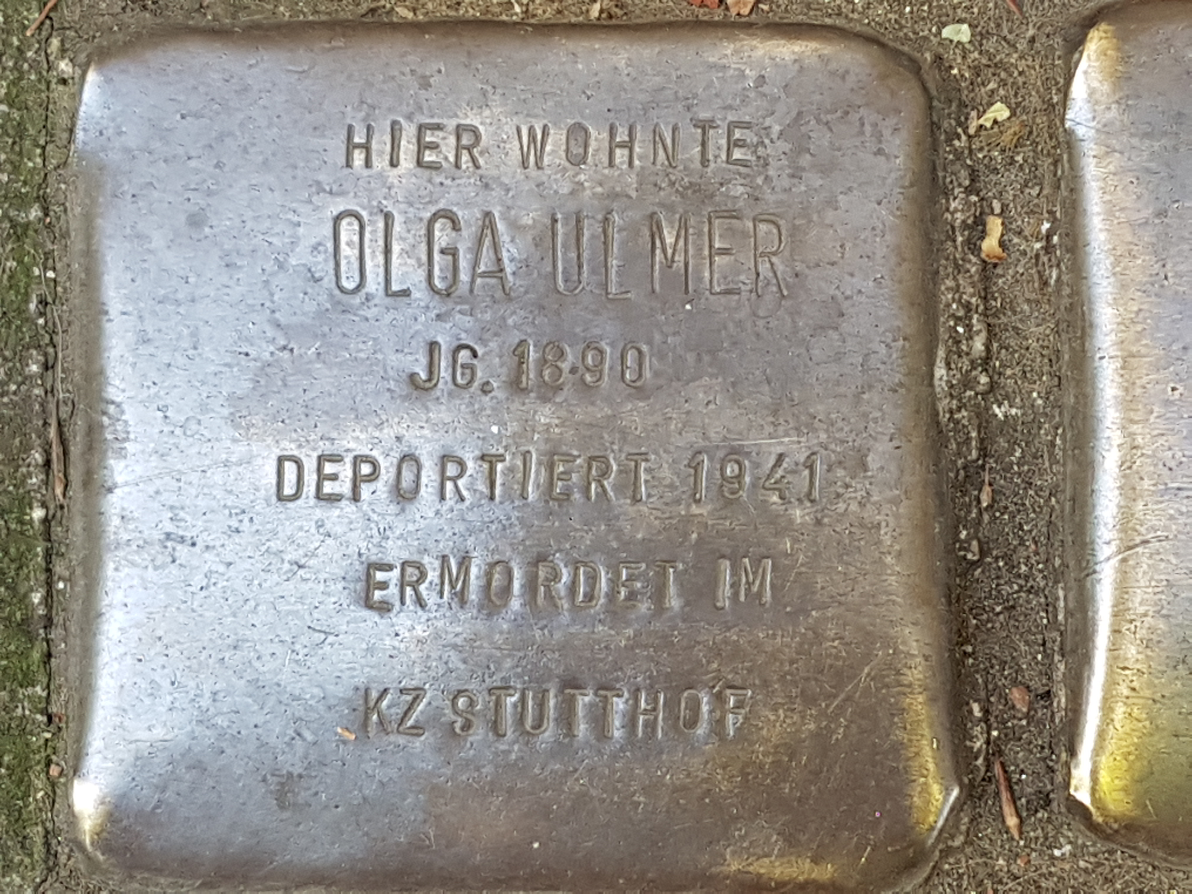 Stolperstein Duisburg